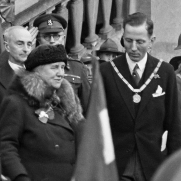 De tocht van koningin Wilhelmina door Zeeland, Brabant en Limburg. Koningin Wilhelmina bij het verlaten van het stadhuis te Maastricht begeleid door burgemeester Willem Michiels van Kessenich . maart 1945